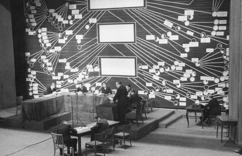 Dessau, Herwegen-Prozeß ADN-ZB/Illus - Paalzow Schlußphase und Urteilsverkündung im Dessauer Millionenschieber-Prozeß am 29.04.1950 vor dem ersten Strafsenat des Obersten Gerichts der Deutschen Demokratischen Republik im Landestheater Dessau gegen den ehemaligen Minister für Arbeit und Sozialwesen in Sachsen-Anhalt, Dr. Leo Herwegen und seine Mitangeklagten wegen Sabotage der Überführung des Konzerns der Deutschen Continentalen Gasgesellschaft in das Eigentum des deutschen Volkes. Den Prozeß führte die Vizepräsidentin des Obersten Gerichts Hilde Benjamin (Bildmitte). UBz den Anglagevertreter Generalstaatsanwalt Dr. Ernst Melsheimer bei seinem Schlußplädoyer. 6322-50